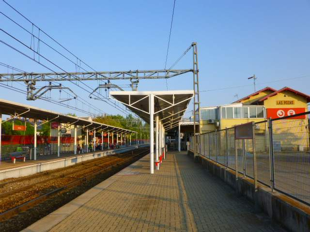 Estación de tren de Las Rozas (Madrid)